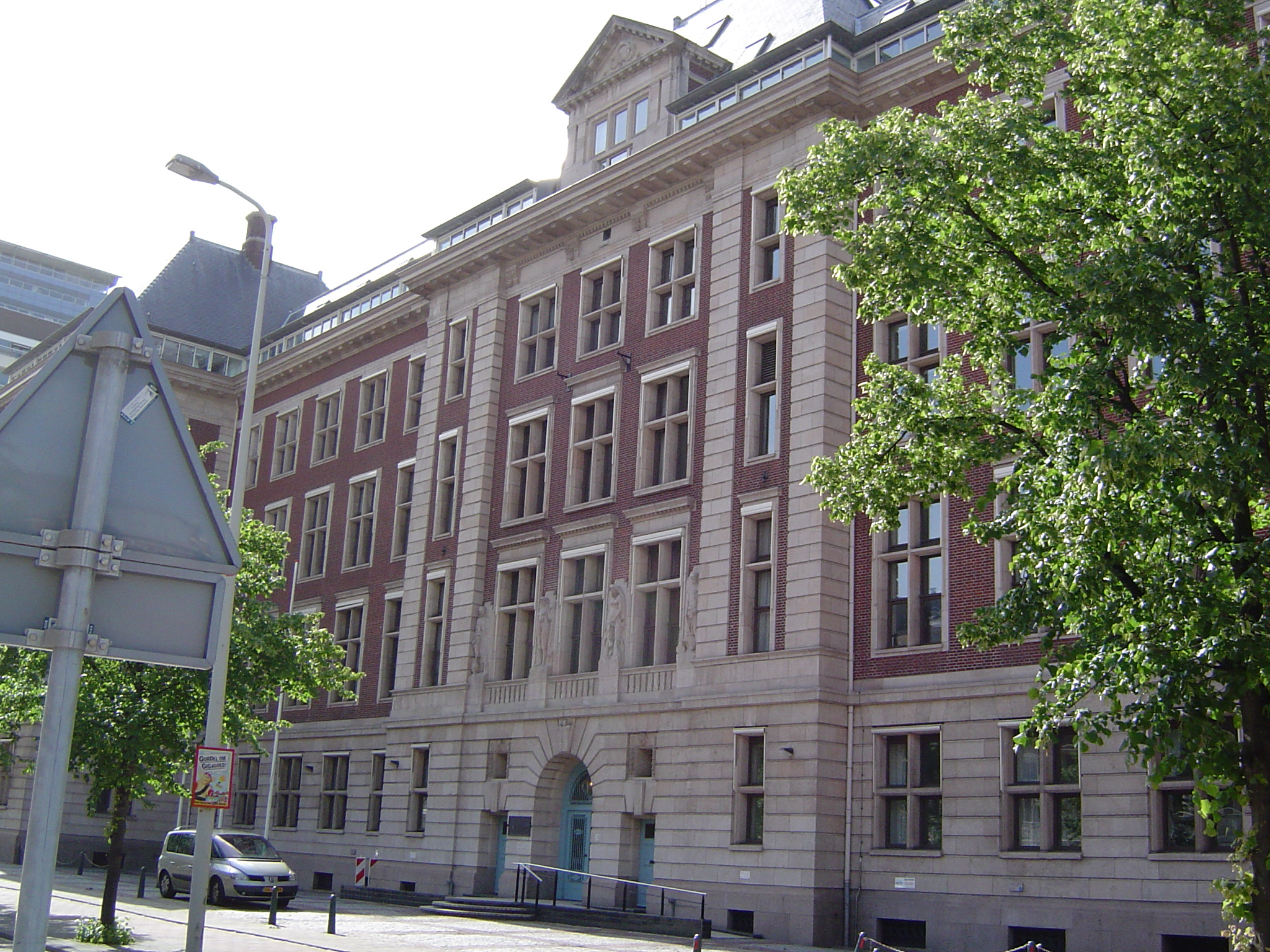 Ministerie van Economische Zaken, The Hague, Holland